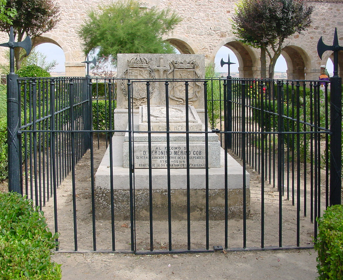 Tumba del Cura Merino que se encuentra en la ciudad de Lerma (Burgos, España). Tomb of the Cura Merino (Priest Merino) in Lerma (Burgos, Spain).